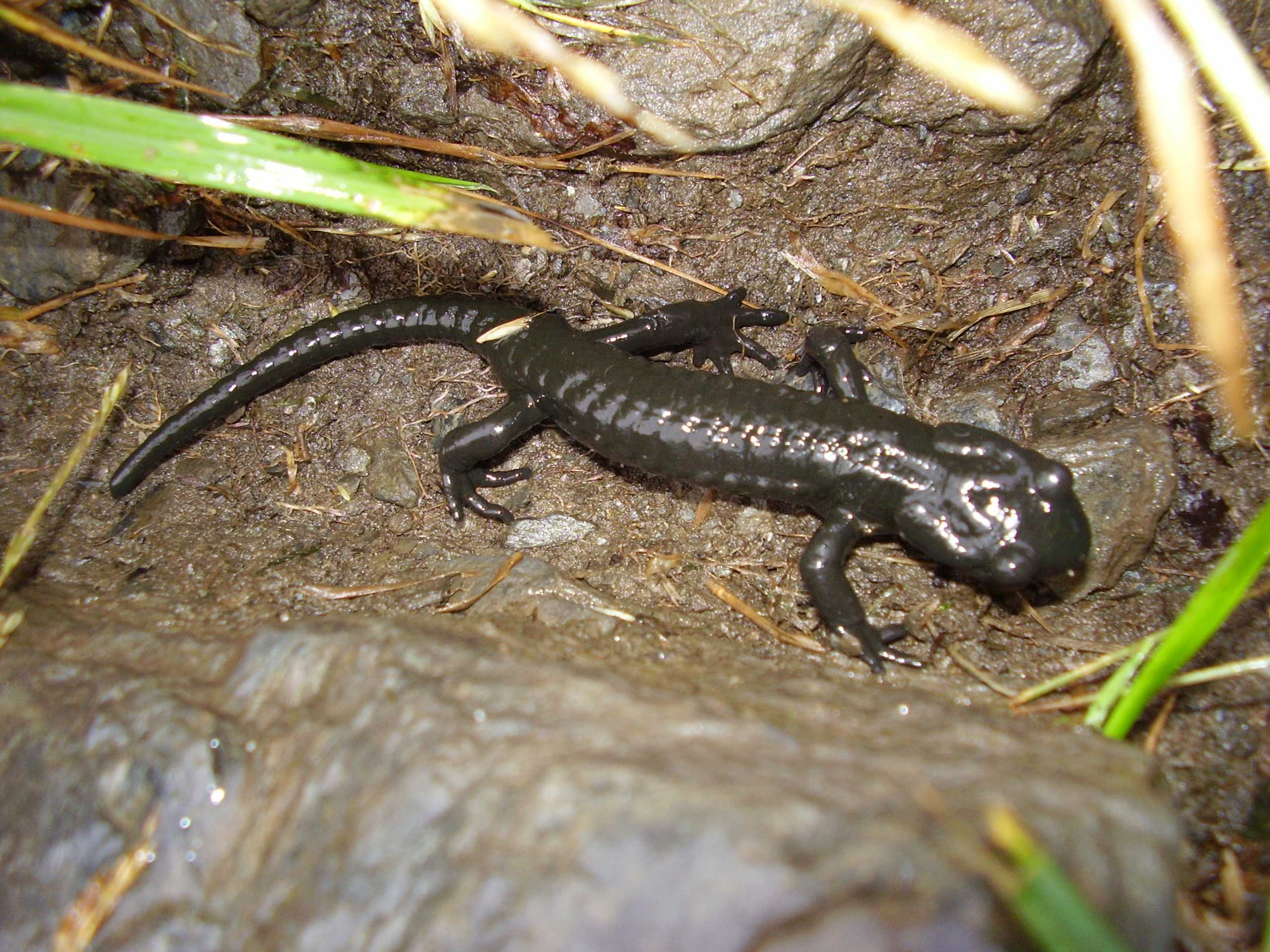 fatta da me